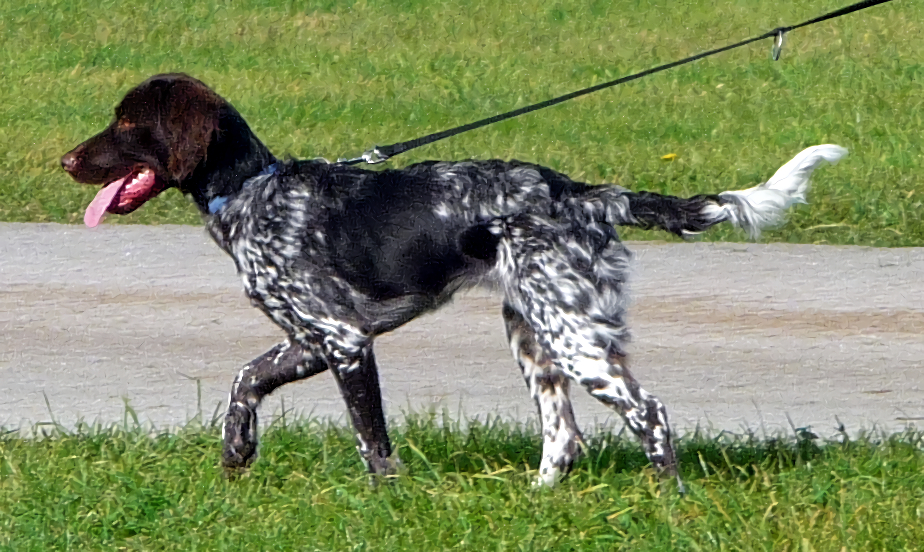 Kleiner Münsterländer